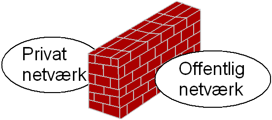 Firewall Funktionen